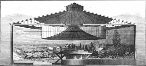 Cyclorama illustrating the battle of Gettysburg on exhibition in Brooklyn